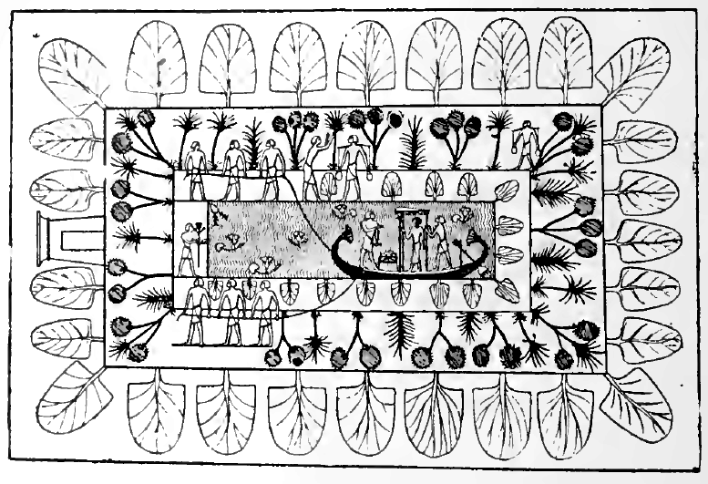 Starověká egyptská zahrada na basreliéfu v hrobce. Obrázek z knihy G. Riata, L'art des jardins.